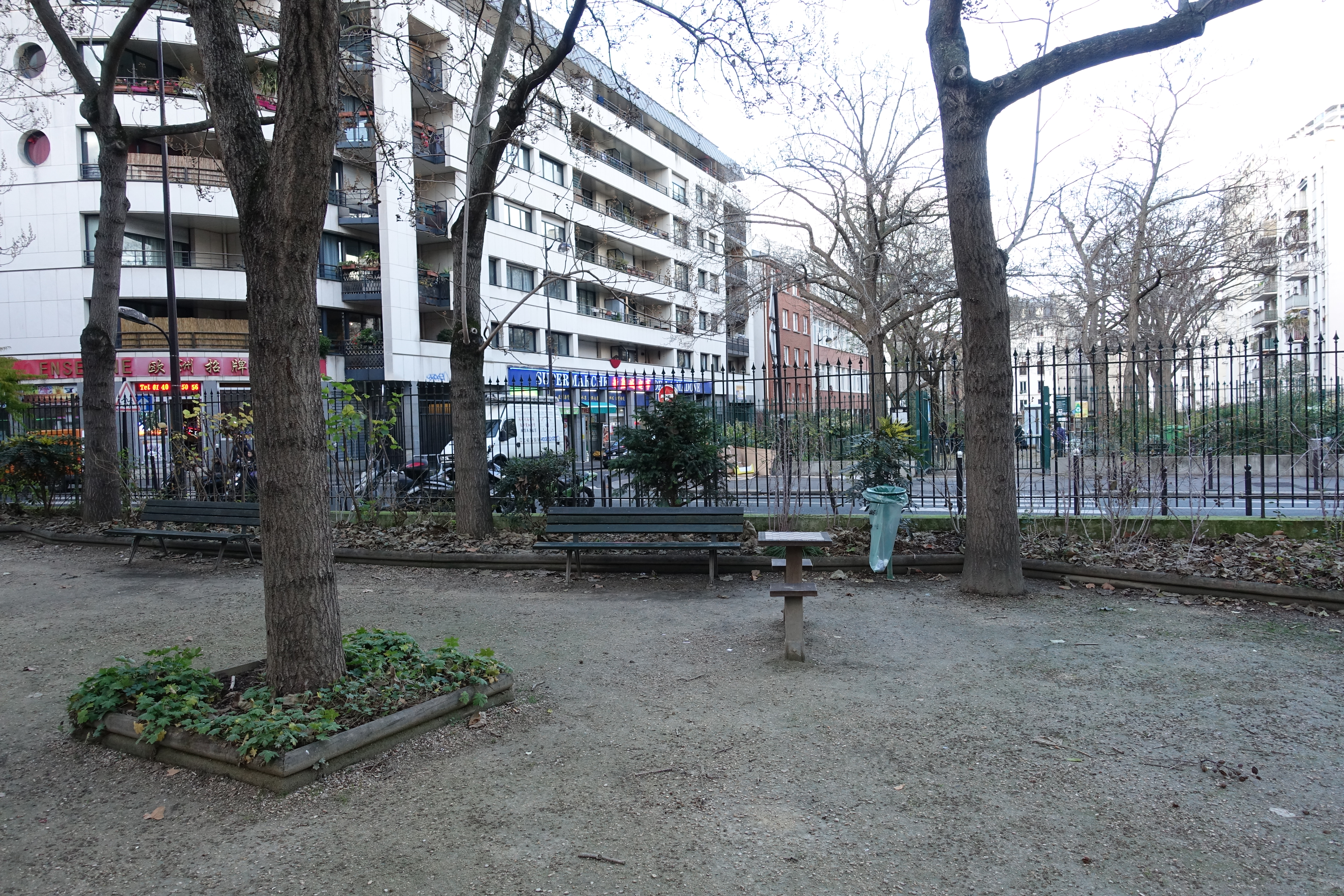 Square Marc Séguin @ Paris 18